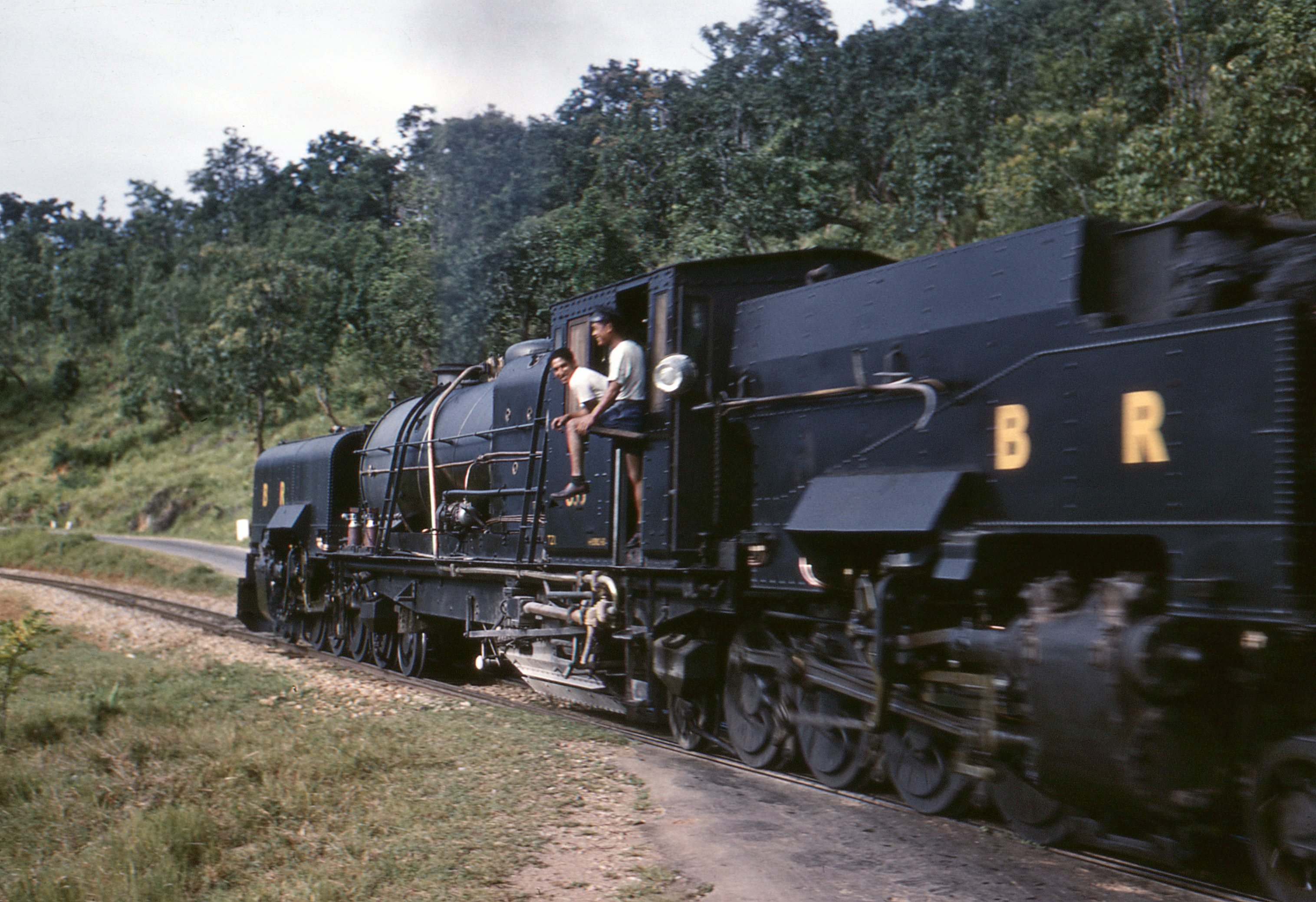 Dampflokomotive der Burma Railway